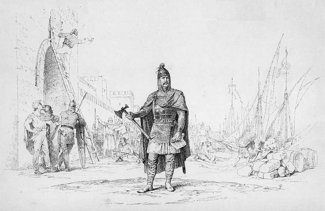 Олег Правитель. Первый исторический Киевский князь, Олег, доходил до самого Царьграда, к вратам которого прибил свой щит и заключил выгодный для русской торговли мир с Греками. Народ прозвал Олега "Вещим" (мудрым).